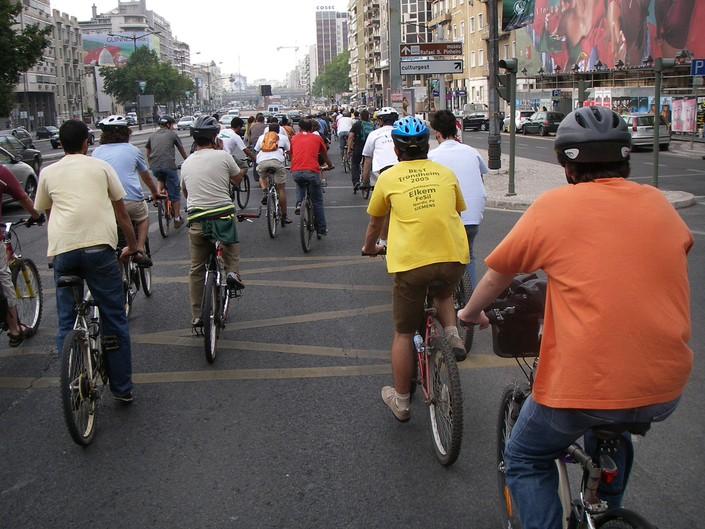 Foto da Bicicleta - Massa Crítica de Lisboa em 30 de Junho de 2006, tirada por anabananasplit na Av. República